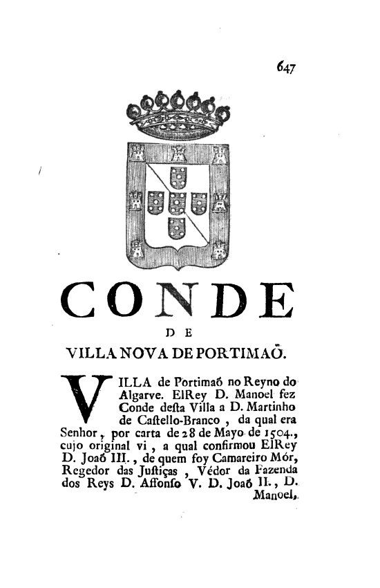 Página 647 das Memorias Historicas e Genealogicas dos Grandes de Portugal ― Conde de Villa Nova de Portimão